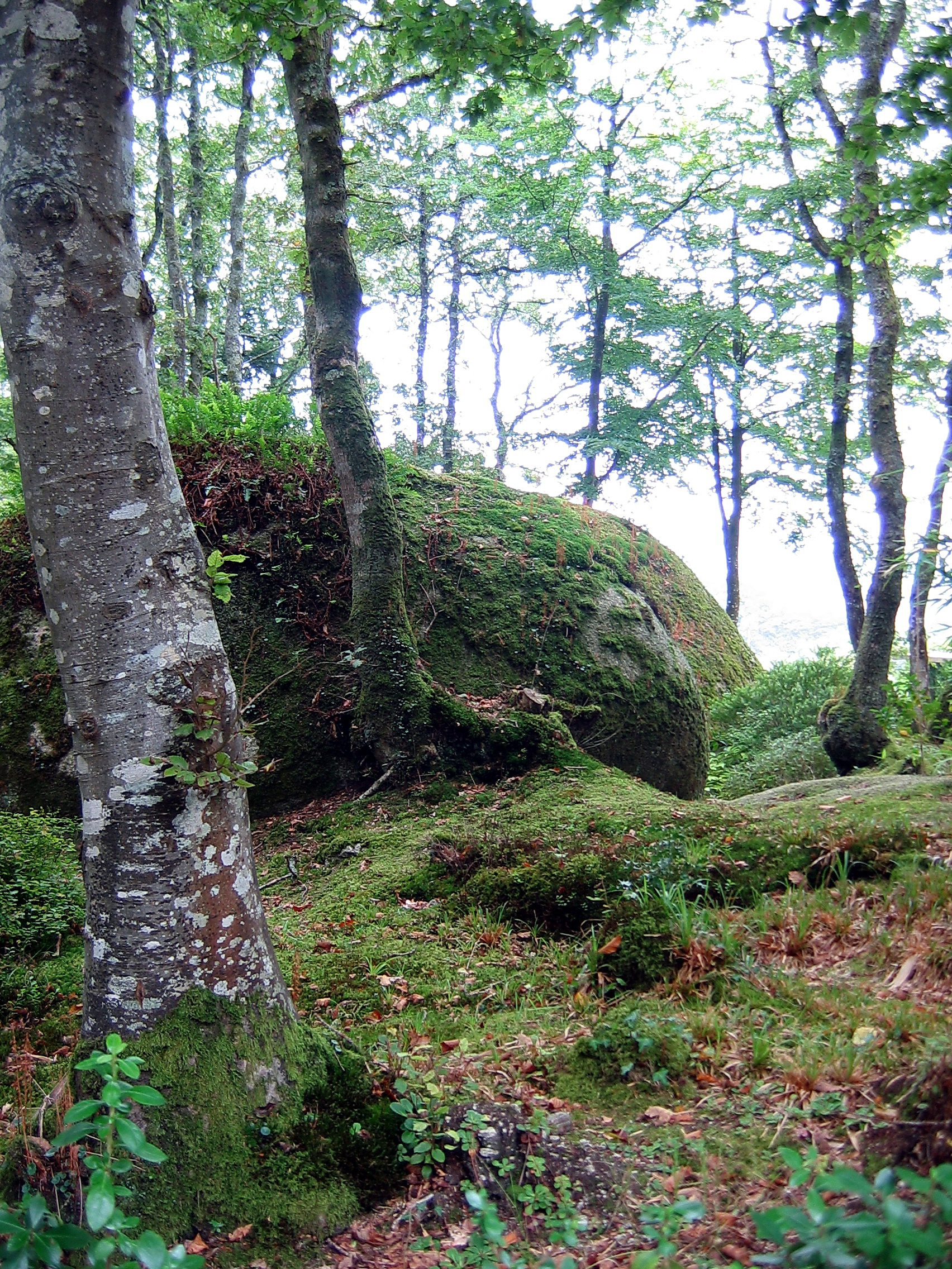 Huelgoat, pris par mes soins